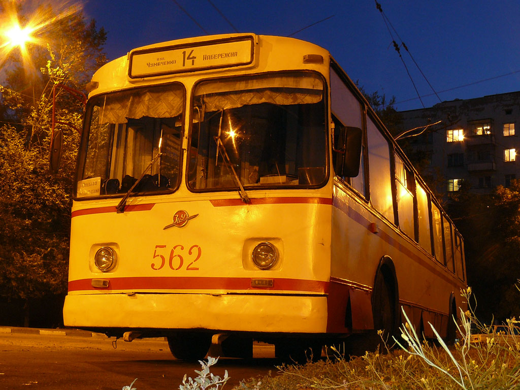 Троллейбус ЗиУ-9б 1975 гв в г. Запорожье